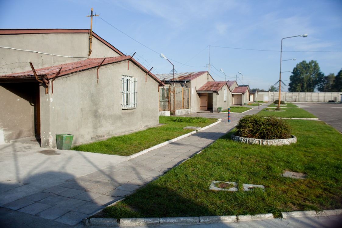 Zakład Karny Stargard, budynki więzienne.